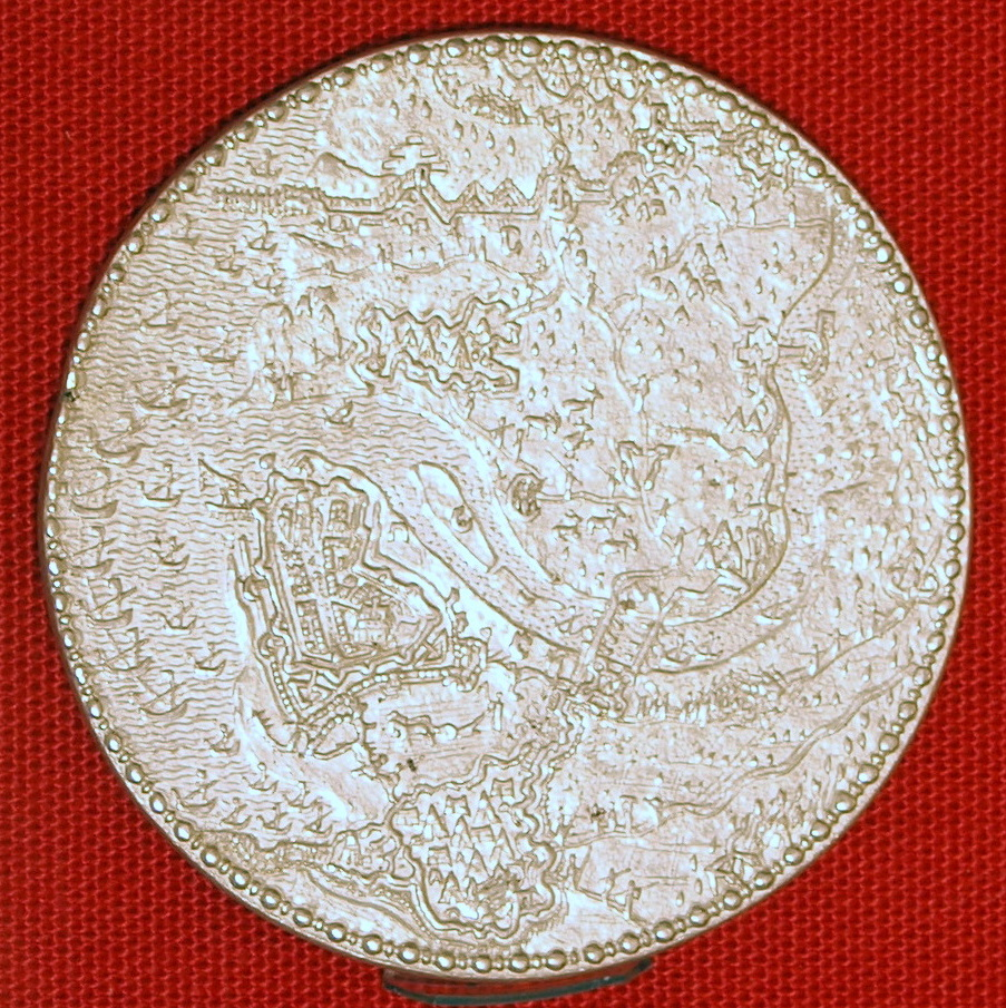 Inname van Geertruidenberg, 1593, door Gerard van Bylaer.